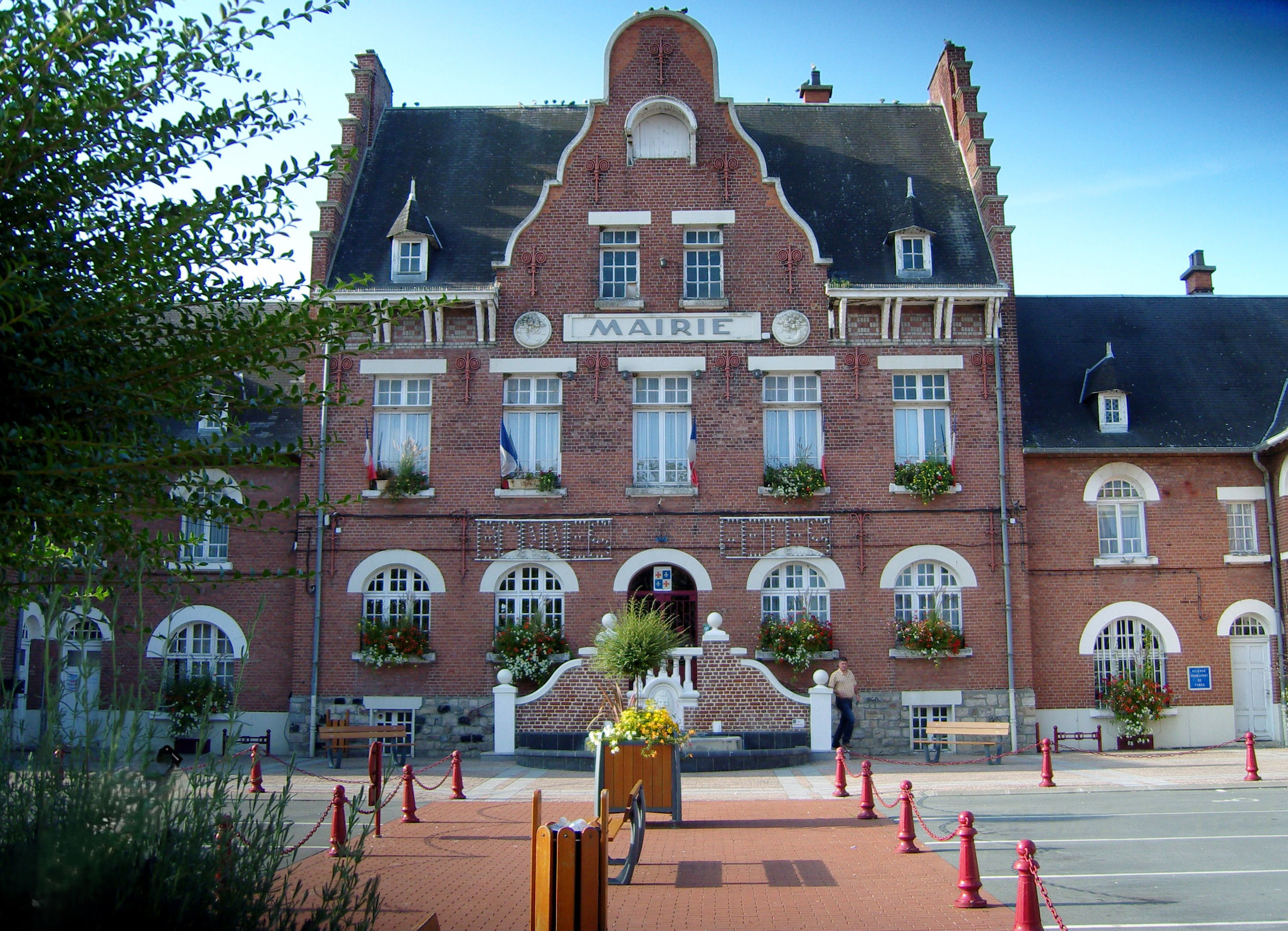 Mairie de Biache-Saint-Vaast